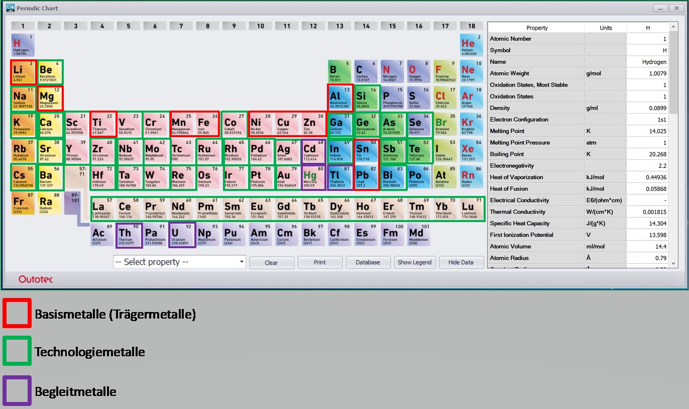 Die Elemente im Periodensystem werden in Basismetalle (Trägermetalle), Begleitmetalle und Technologiemetalle eingeteilt